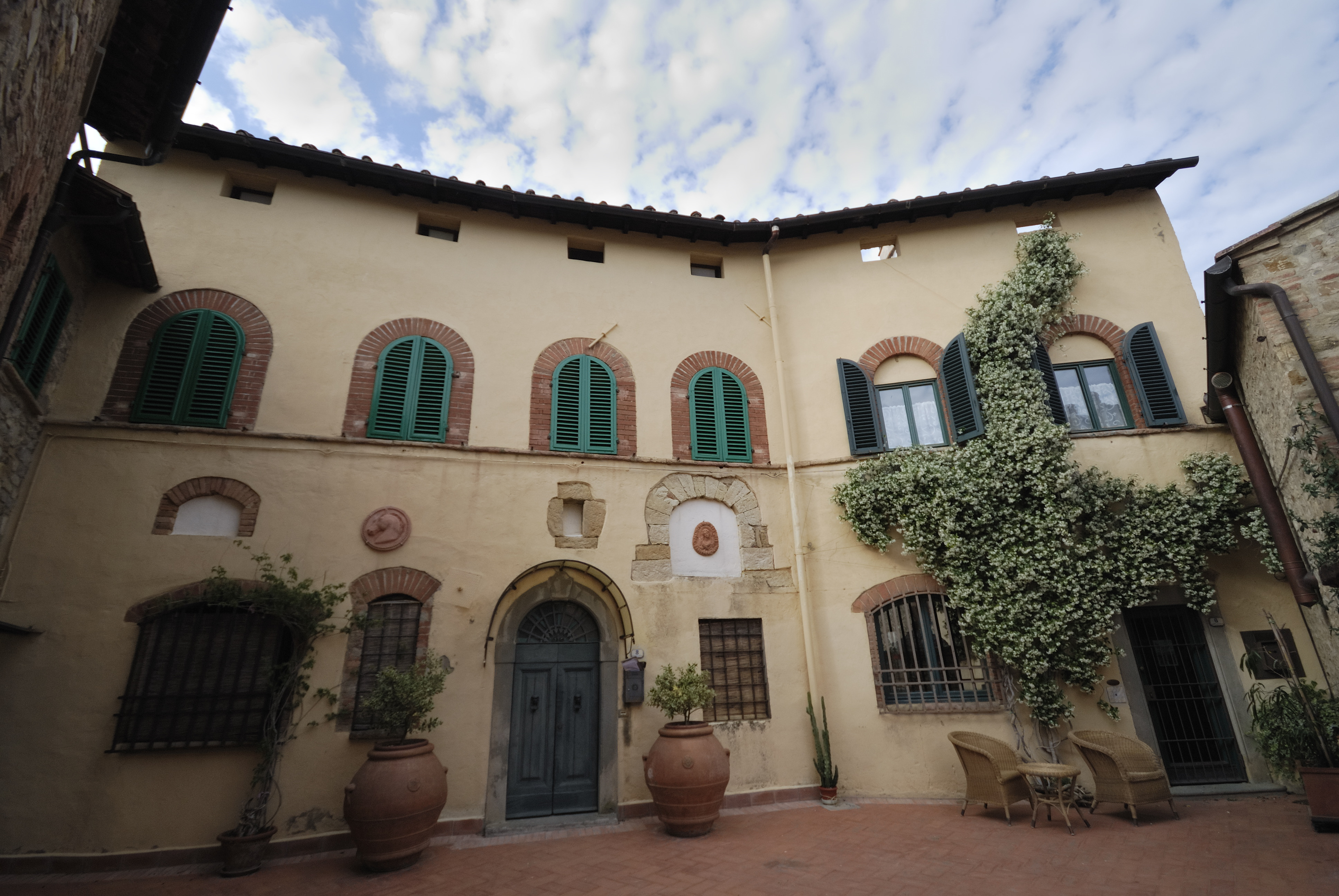 Palazzo dei Begliuomini- Tignano, Barberino Val d'Elsa - Firenze